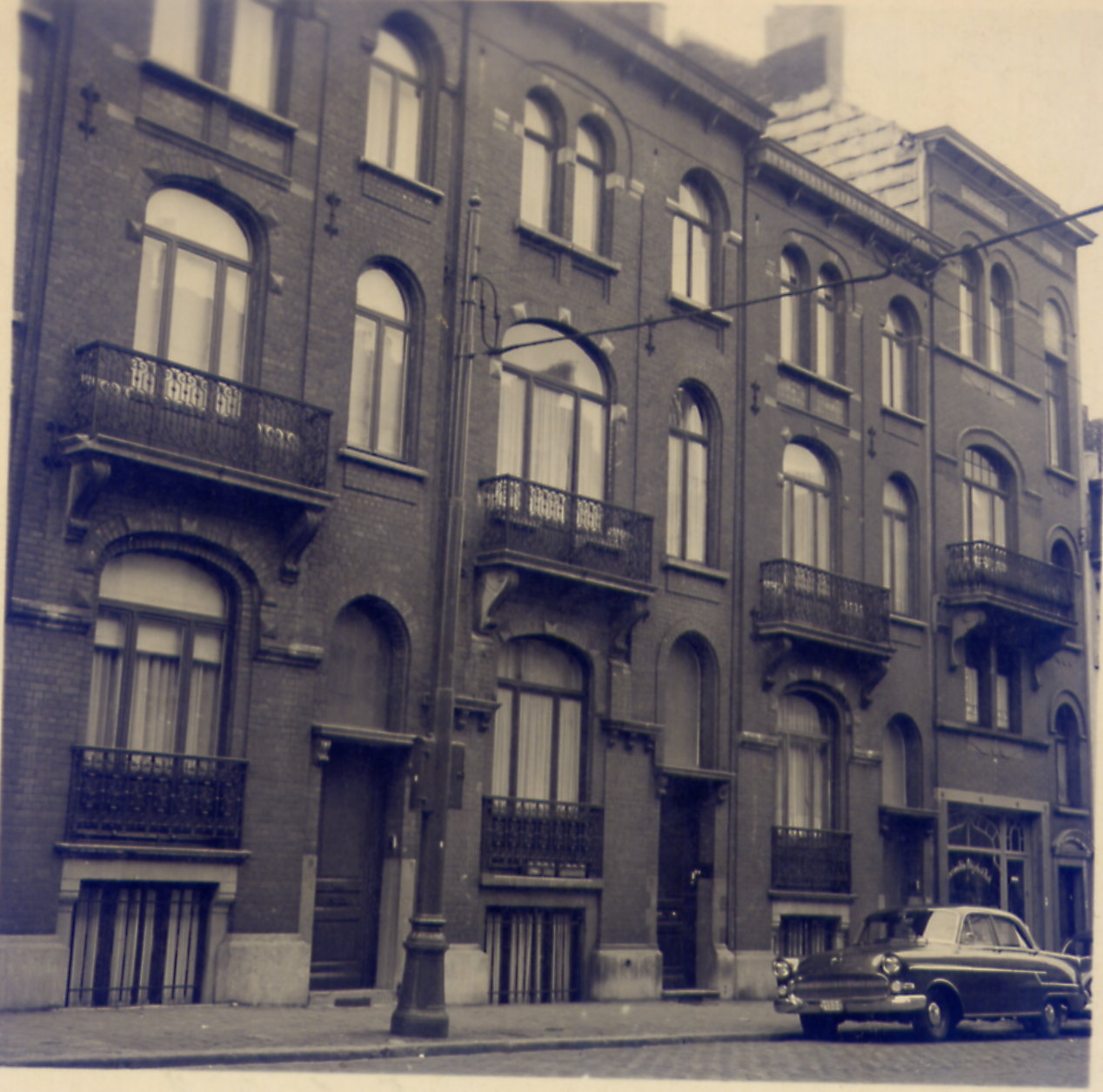 Le début de la rue Franz Merjay à Ixelles, photographie prise le 11 mai 1958.